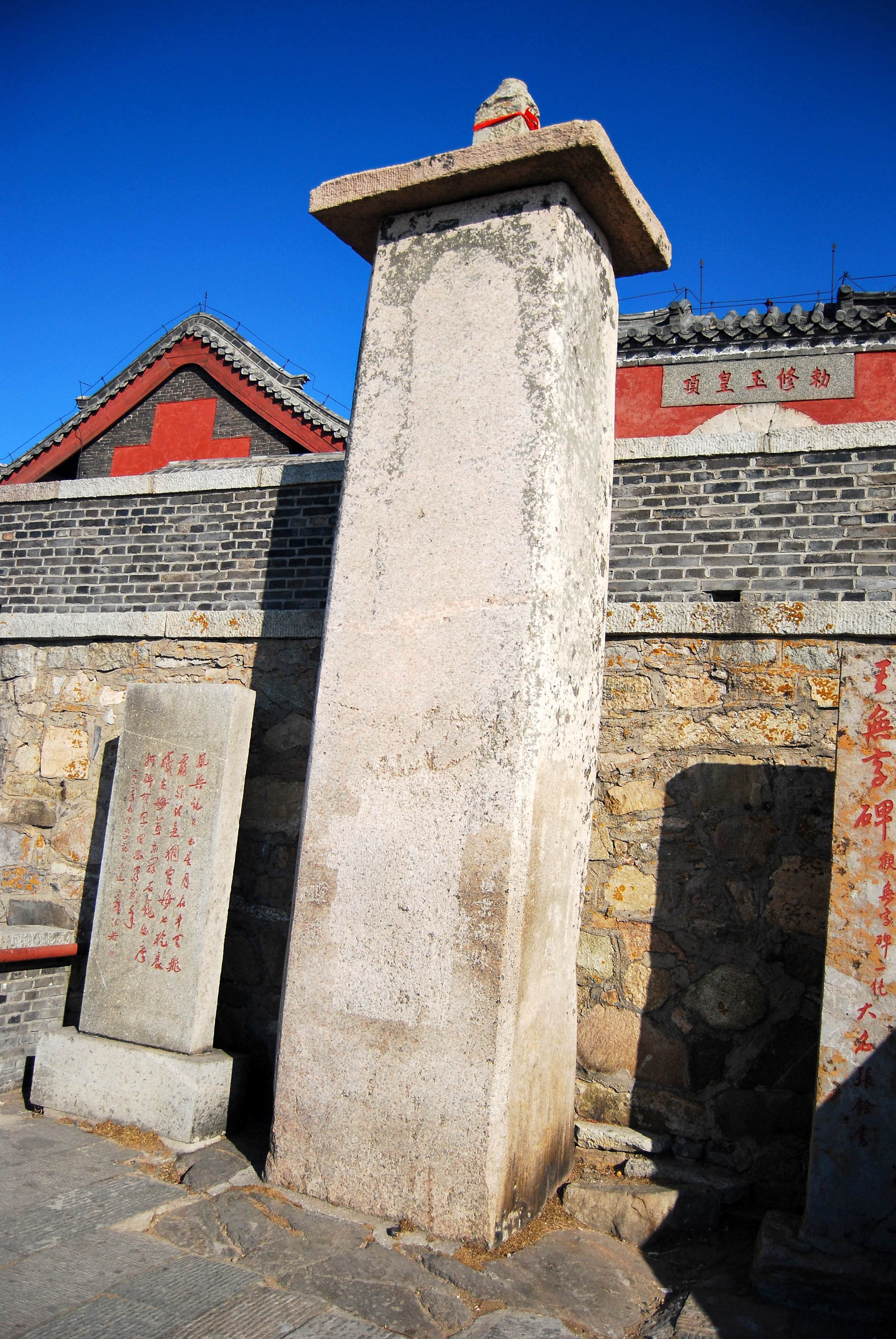 中文（中国大陆）: 泰山无字碑，汉武帝封禅泰山所立